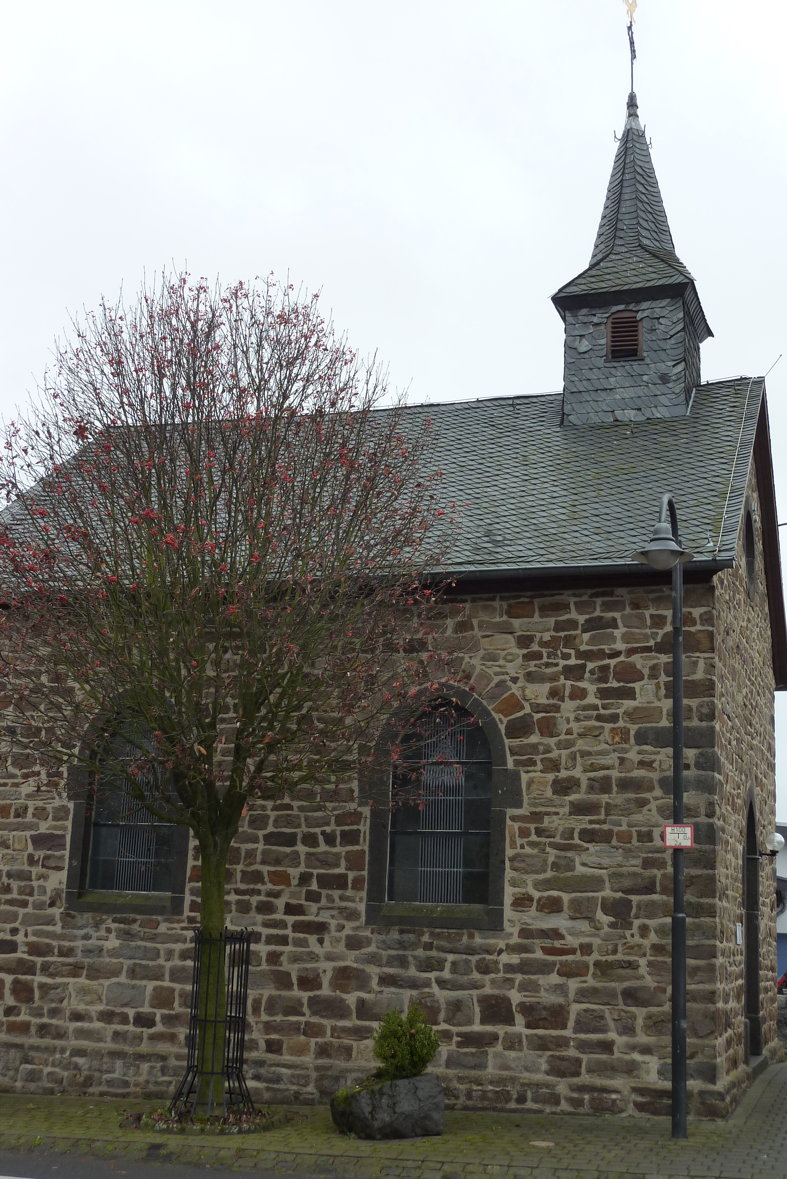 Kapelle St. Lüfthildis in Döttingen, einem Ortsteil der Ortsgemeinde Herresbach